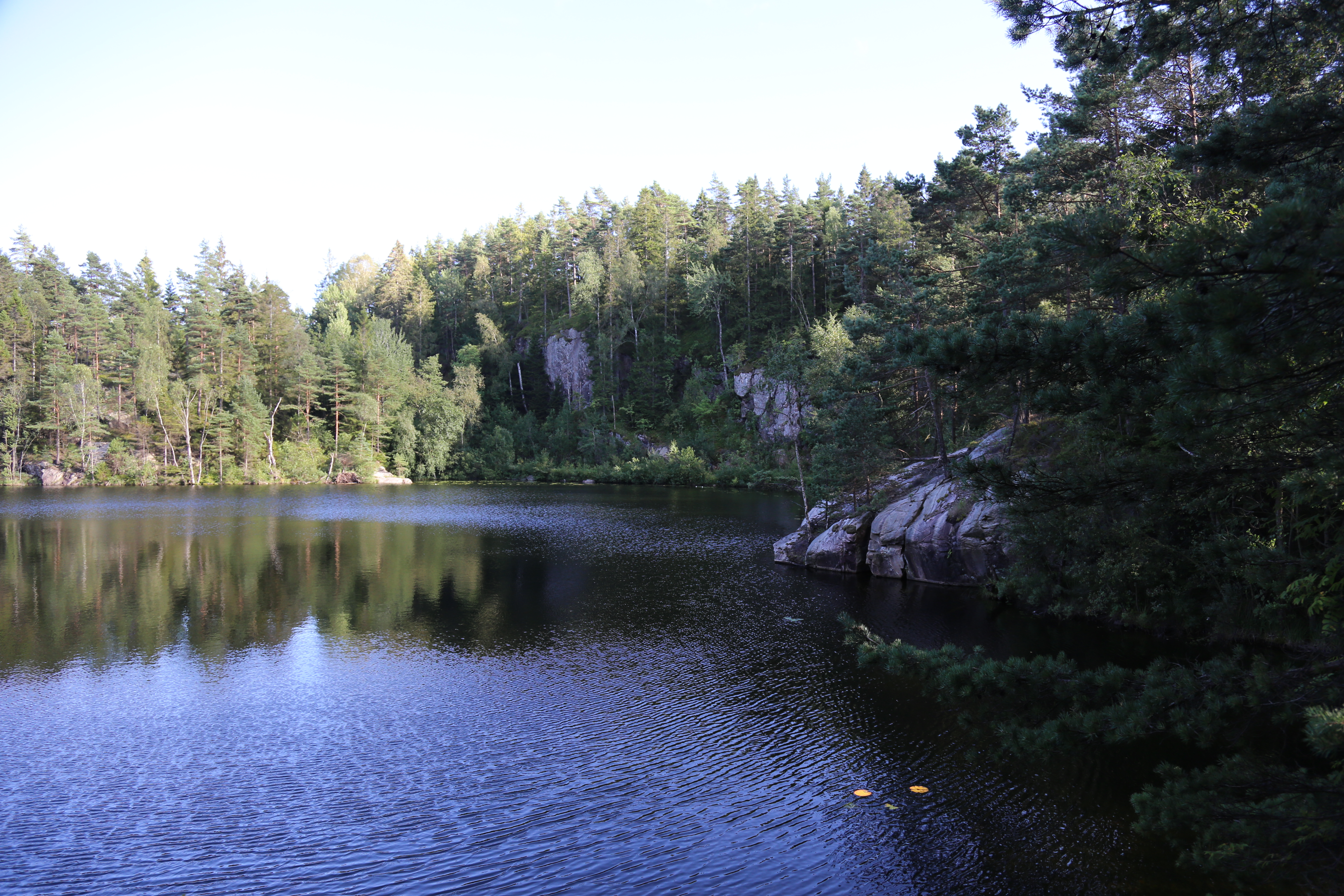 Svärtevatten i Stenungsunds kommun.